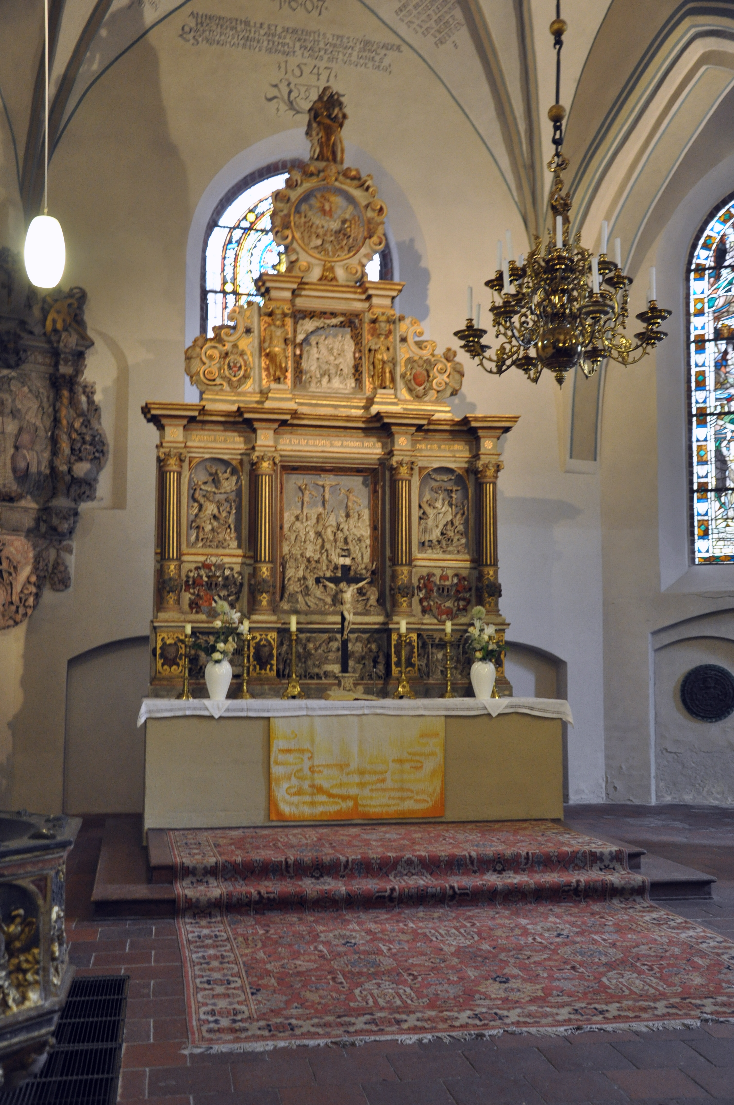 Lübben, Paul-Gerhardt-Kirche, Altar